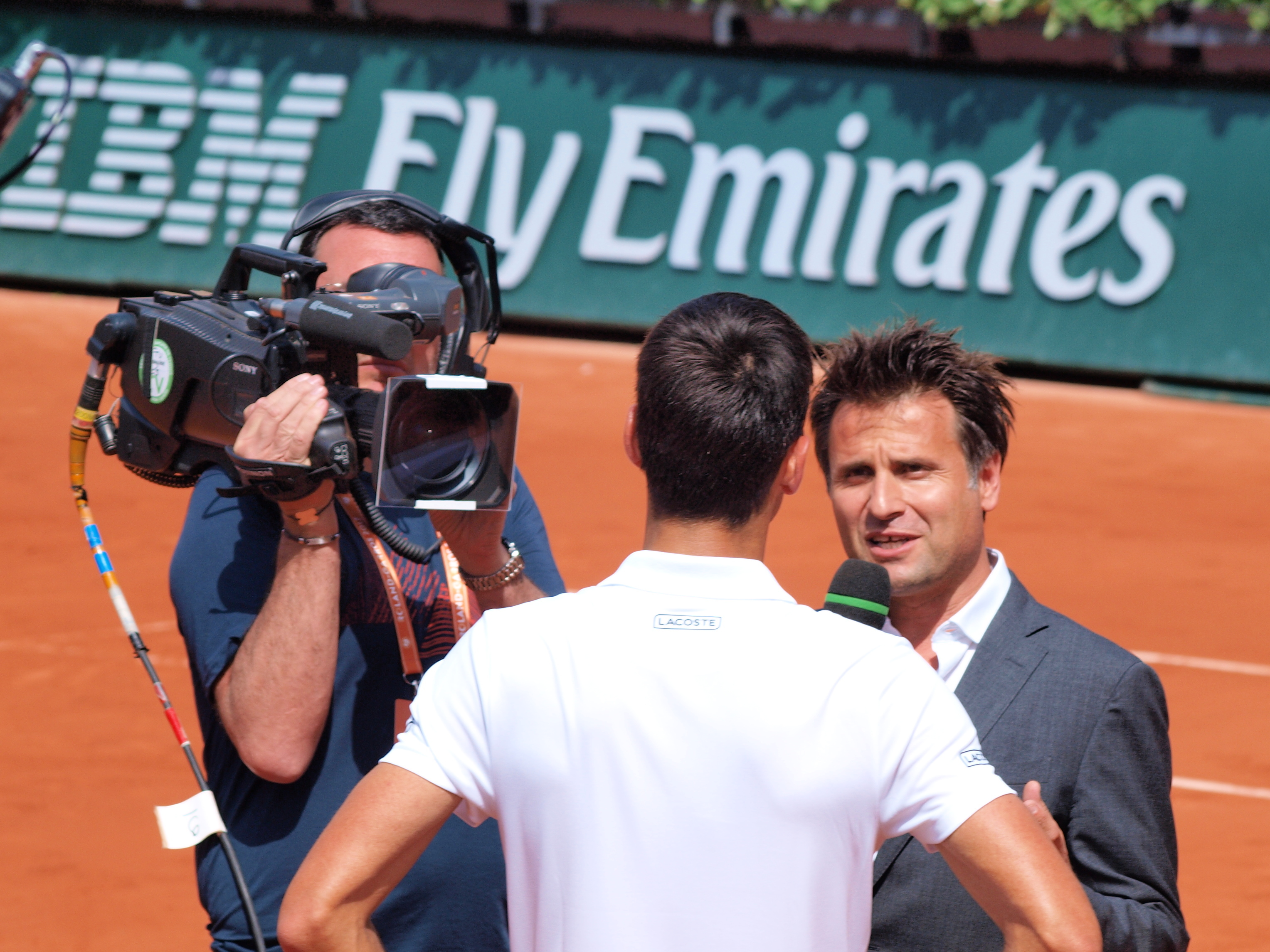 Paris (France) ; open de tennis 2017 de Roland Garros, au stade Lenglen : opérateur de télévision.